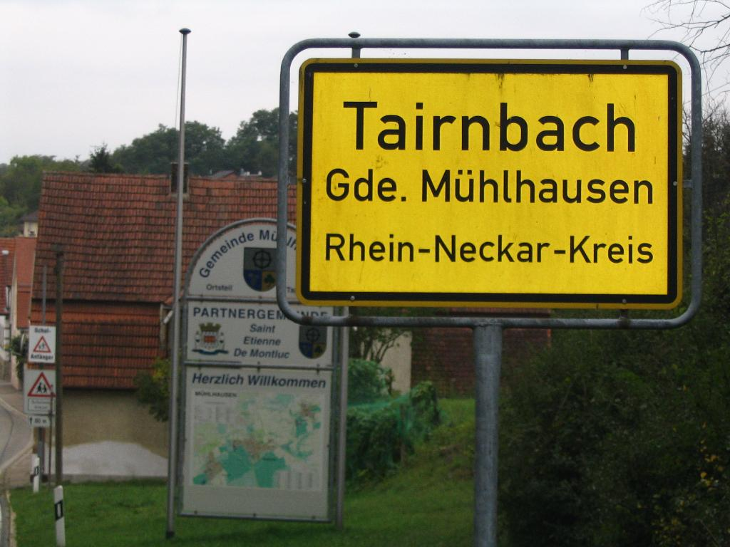 Ortschild von Tairnbach